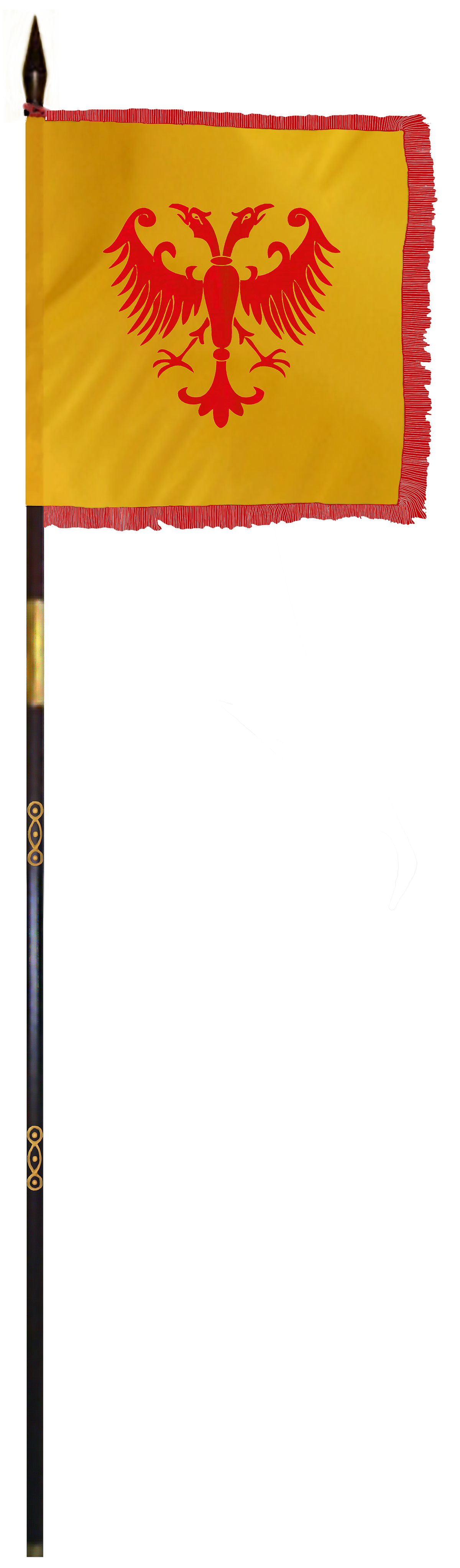 Опис слике: Краљевска династичка застава Немањића (верзија на златној подлози) Аутор слике (реконструисане заставе): Петар Б. Богуновић